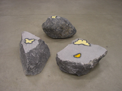 Trois sculptures de la série Butterfly